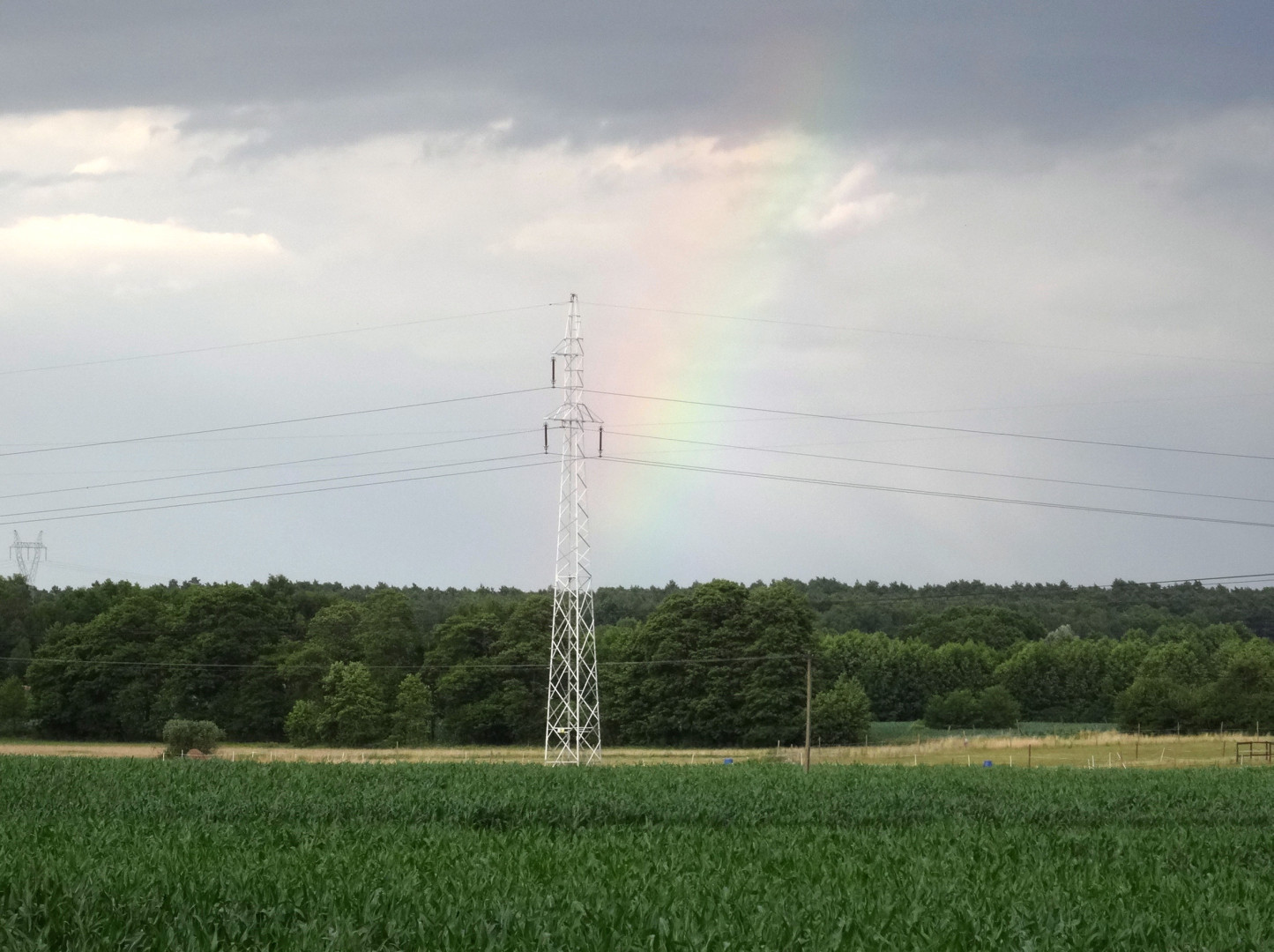 Leszyce, gmina Nowa Wieś Wielka, powiat bydgoski